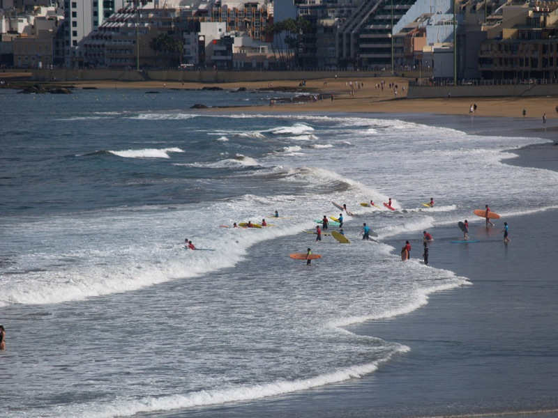 Surfistas en la playa. La Cícer. Playa de Las Canteras. Las Palmas de Gran Canaria.